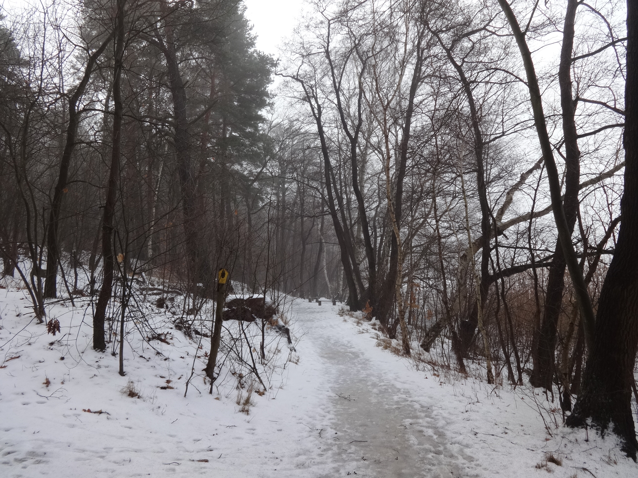 NSG Briesensee und Klingeberg in Teupitz, Brandenburg